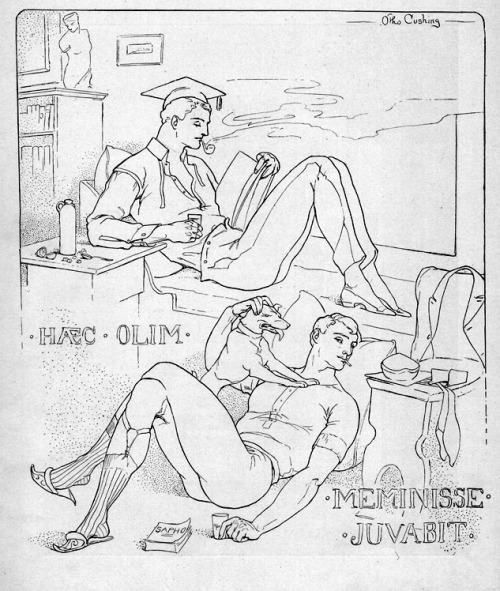 Otho Cushing, in Corks and Curls, Year Book de l'université de Virginie. Haec olim meminisse juvabit, Virgile, Énéide I, 203.